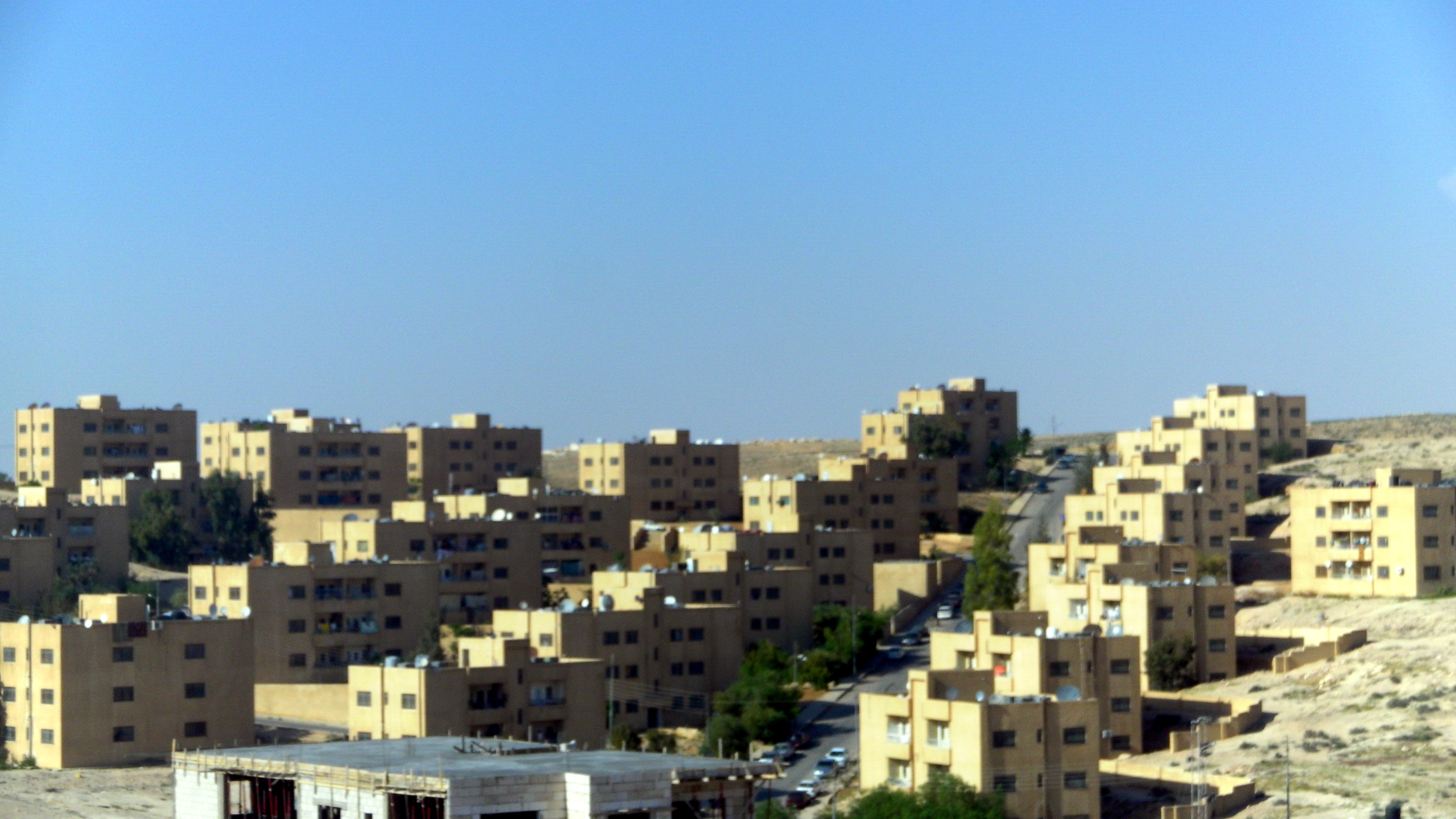 جبل طارق، الزرقاء.